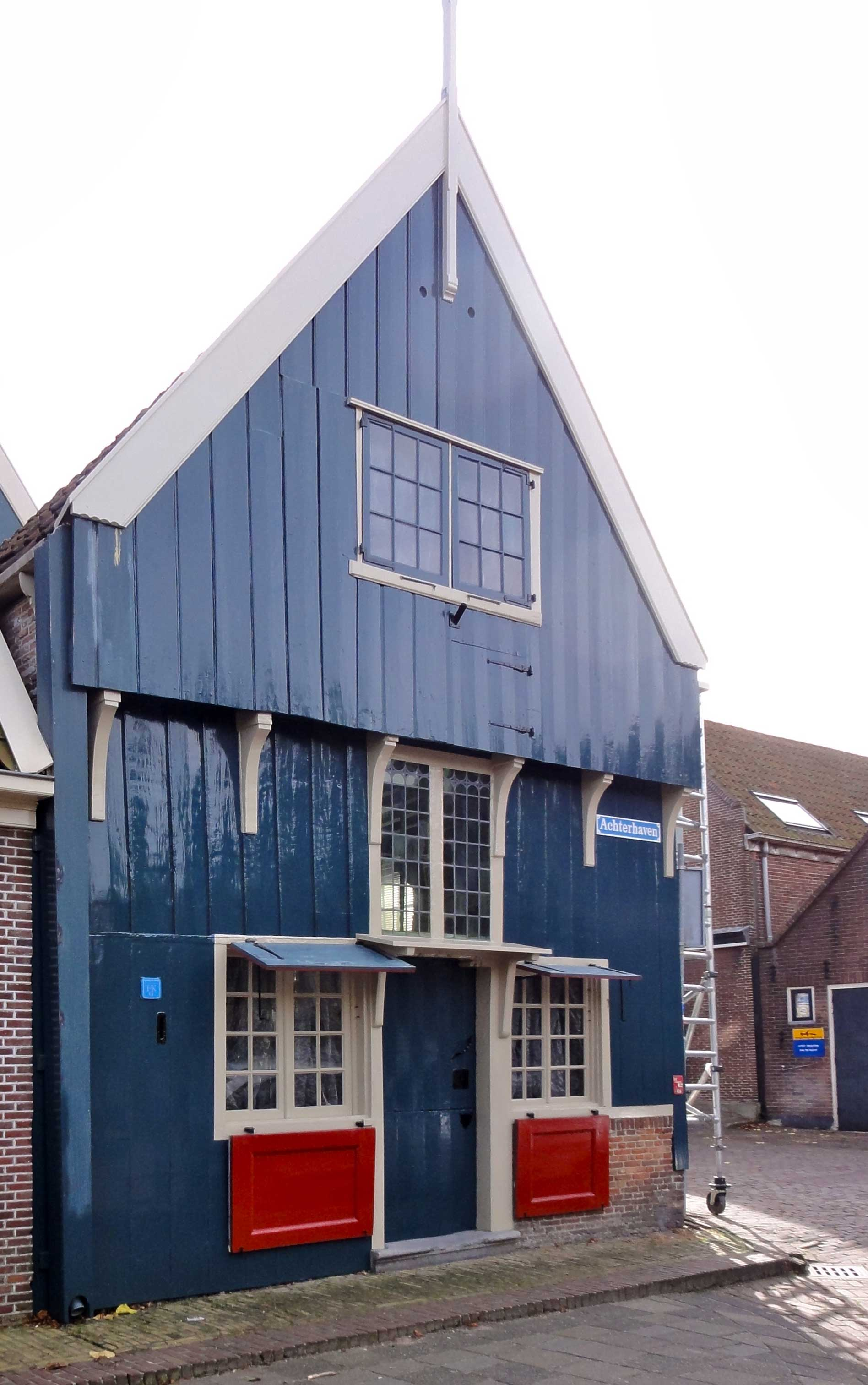 Achterhaven 105, één van de oudste houten huizen van Edam